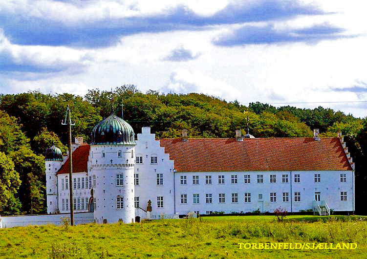 fra landevejen